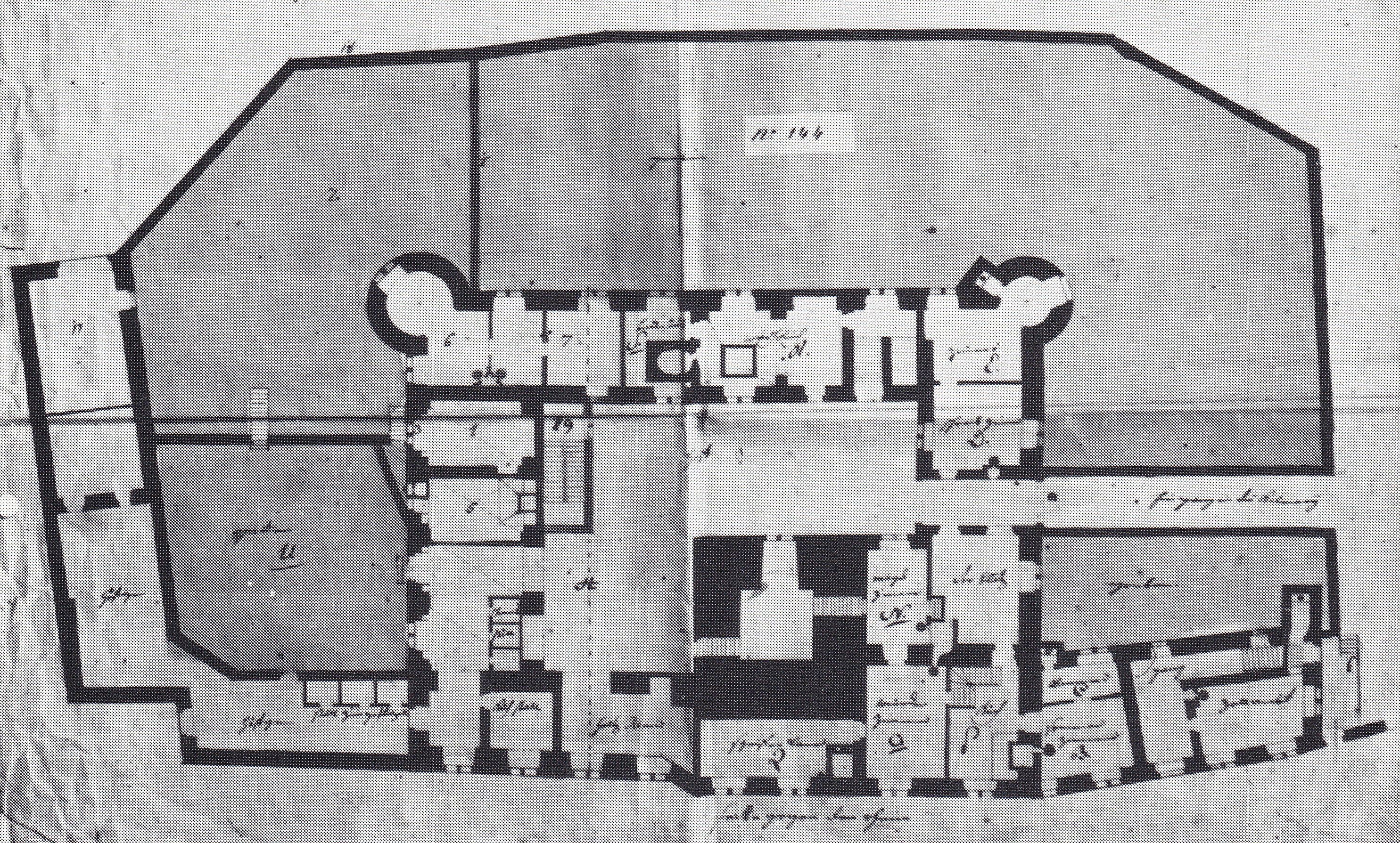 Grundriss des Erdgeschosses der kurfürstlichen Burg von Boppard aus dem Jahr 1788